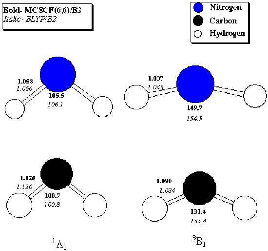 Confronto ione nitrenio e metilene (lunghezza e angoli legami nei due stati di singoletto e tripletto